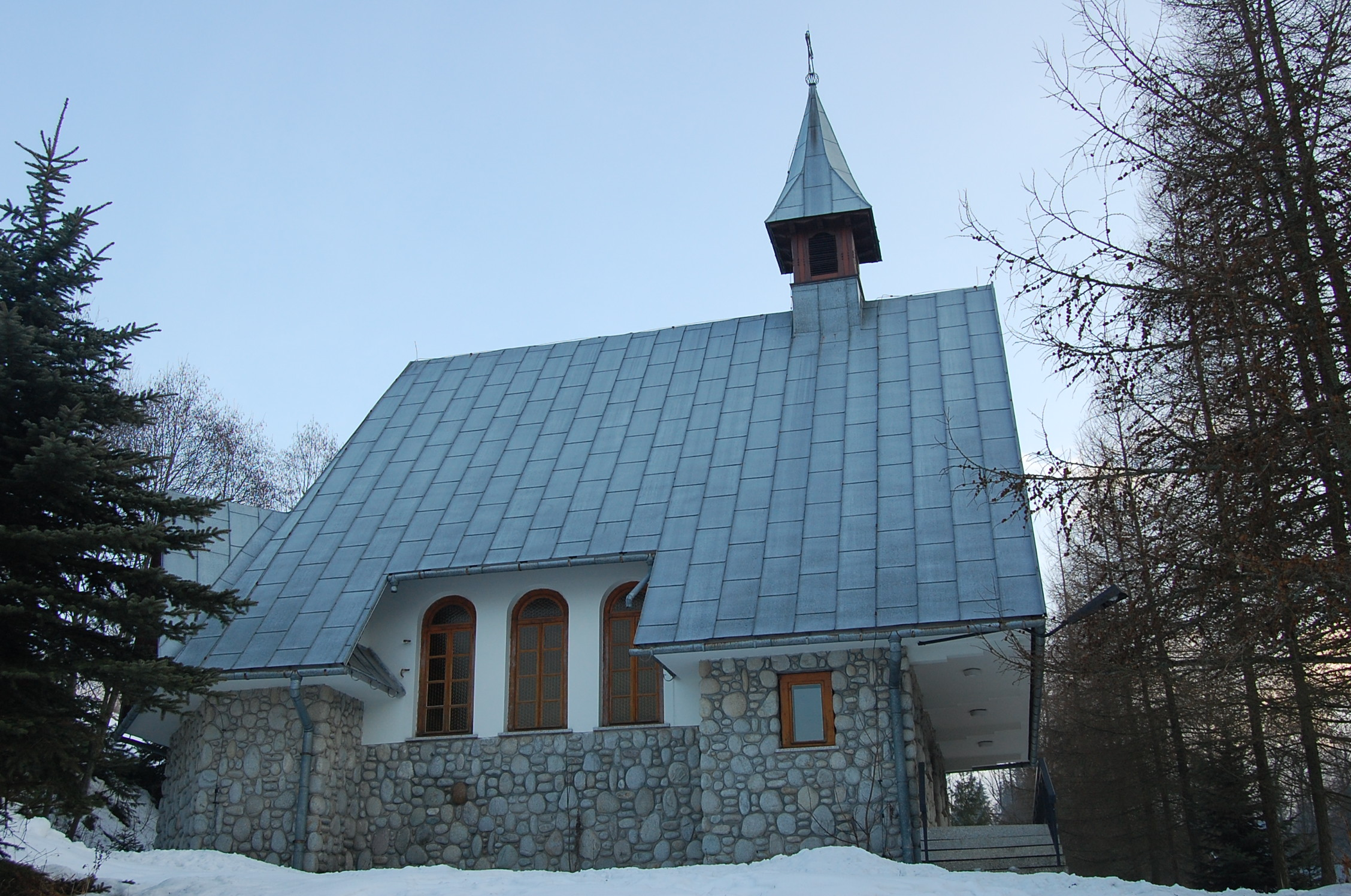 Kościół (kaplica) p.w. św. Jana Chrzciciela w Gliczarowie Dolnym